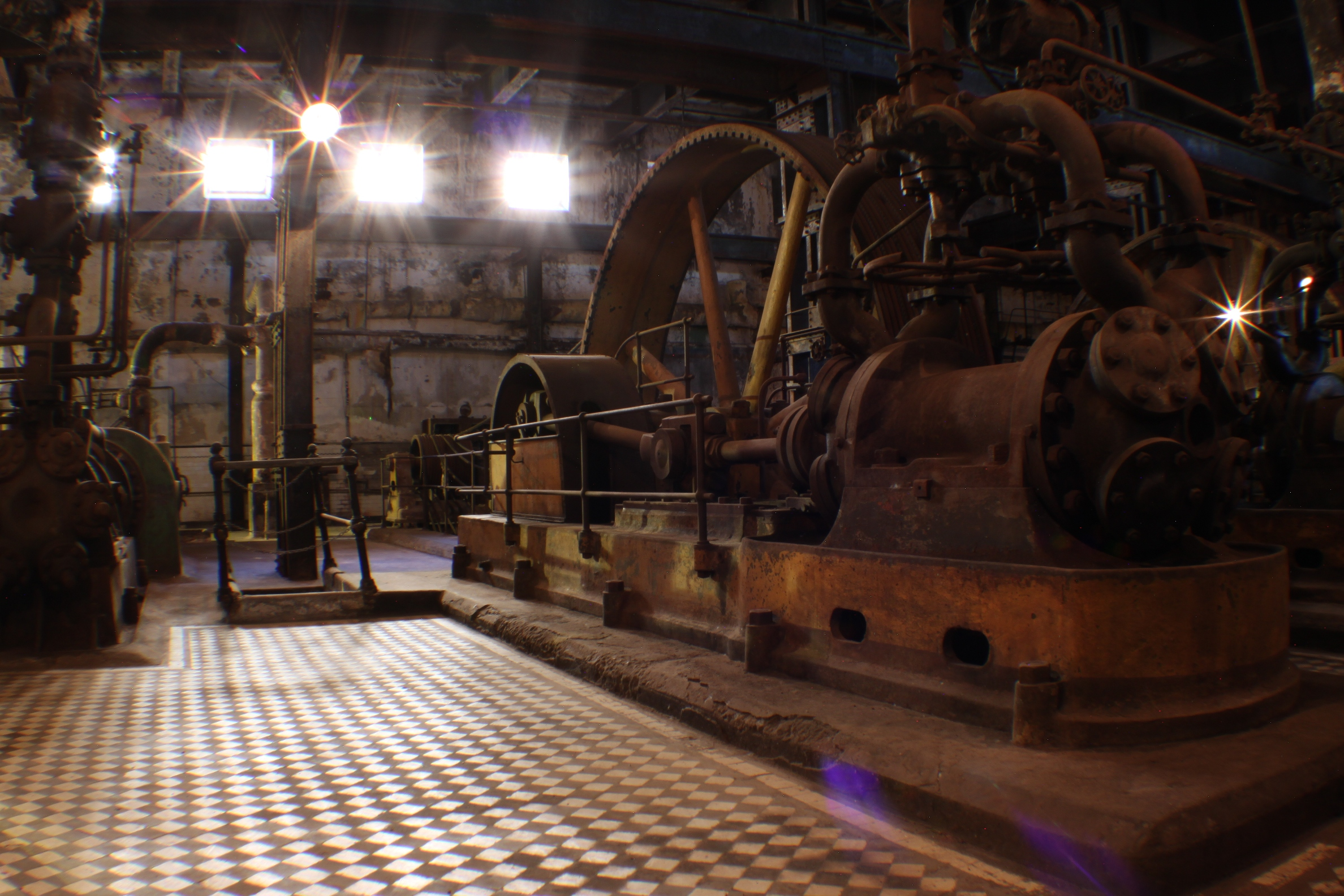 Frigorífico Liebigs y Barrio Obrero Anglo. La totalidad de edificaciones y equipamiento: mobiliario y máquinas, que pertenecieron a la antigua planta industrial del ex - frigorífico Liebigs y el barrio obrero conocido como Barrio Anglo. Ubicada en el departamento de Río Negro En Sala de Maquinas